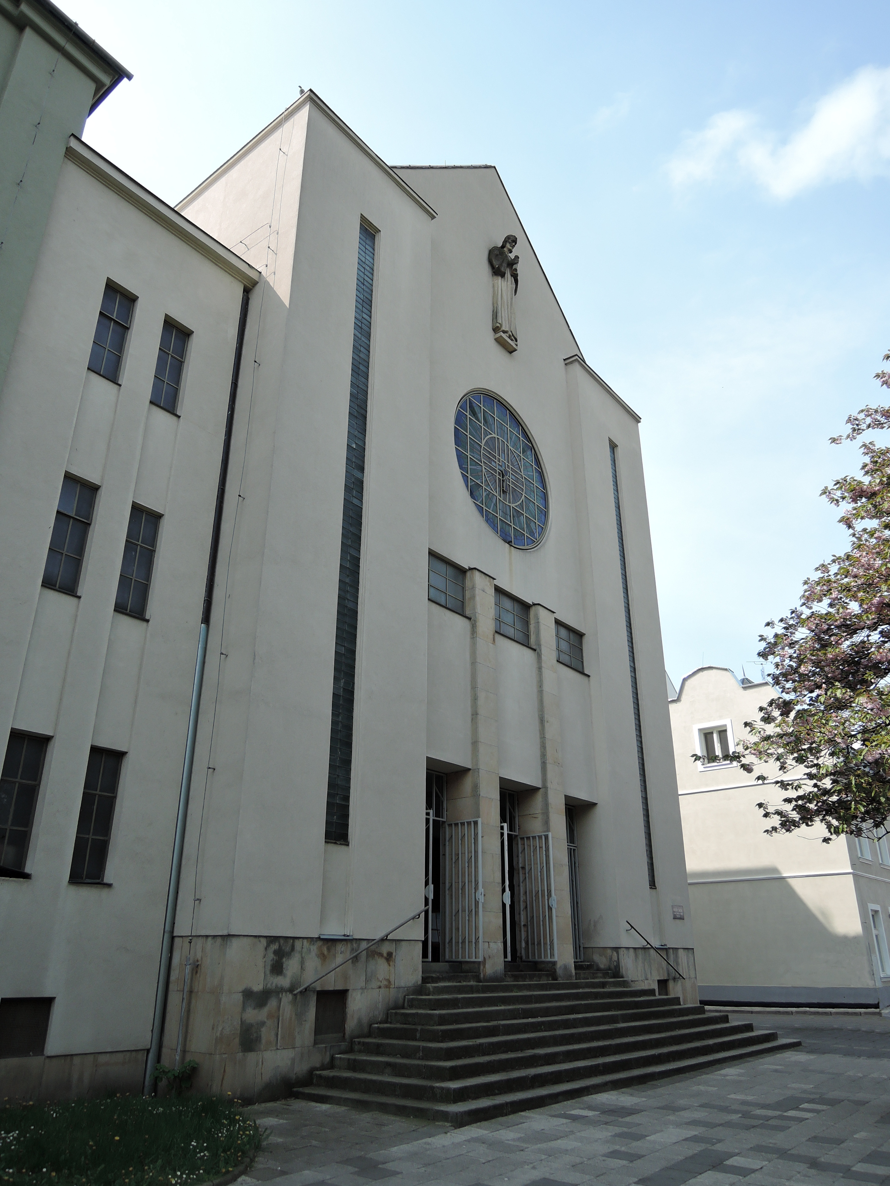 Prostějov, ulice Demelova, bývalá nová synagoga, dnes Husův sbor